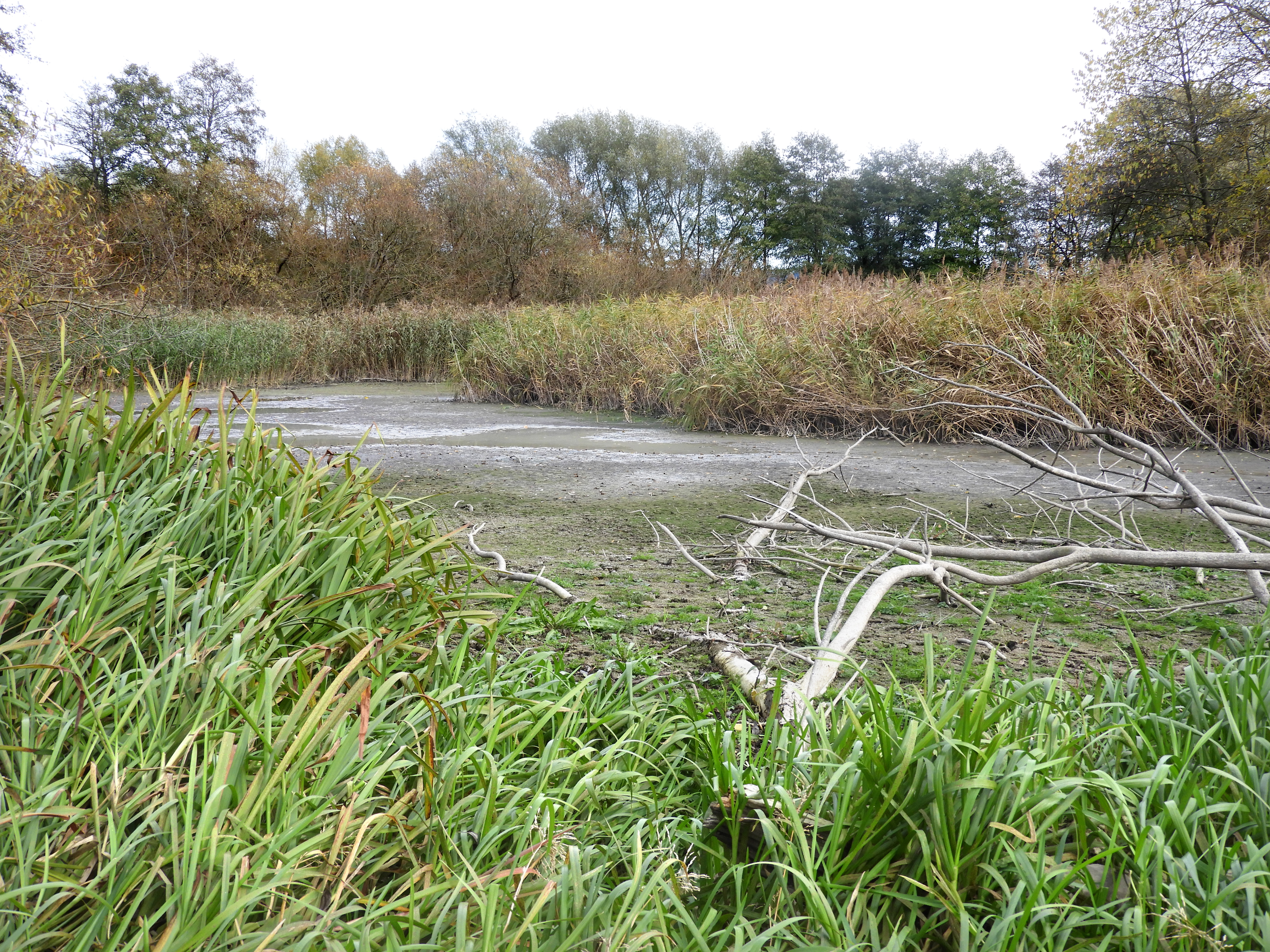 Der Altwasserarm der Werra. Das Frankenloch bei Heldra ist ein natürlich entstandener Altwasserarm der Werra in der Gemarkung von Heldra im nordhessischen Werra-Meißner-Kreis. Wegen der hier vorkommenden seltenen Tier- und Pflanzenarten die im Frankenloch ein Rückzugsgebiet gefunden haben wurde der Bereich 1995 als Naturschutzgebiet ausgewiesen. Seit 2008 gehört das Frankenloch auch als Flora-Fauna-Habitat-Gebiet zu dem europäisch vernetzten Schutzgebietssystem Natura 2000.